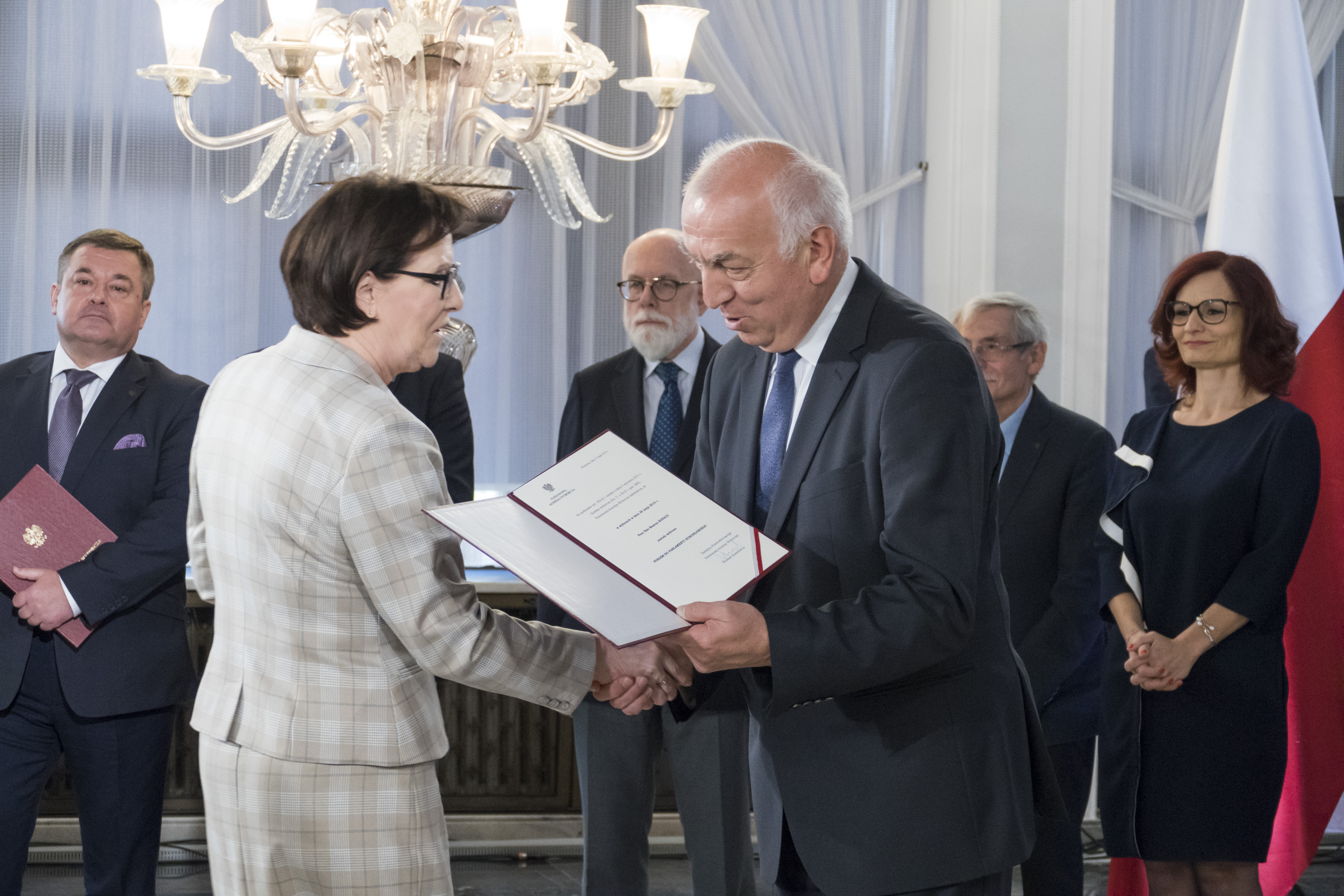 Od prawej: sekretarz PKW i szef KBW Magdalena Pietrzak, sędzia PKW Zbigniew Cieślak, sędzia PKW Wiesław Kozielewicz, sędzia PKW Janusz Niemcewicz, europosłanka Ewa Kopacz, sędzia PKW Arkadiusz Despot-Mładanowicz